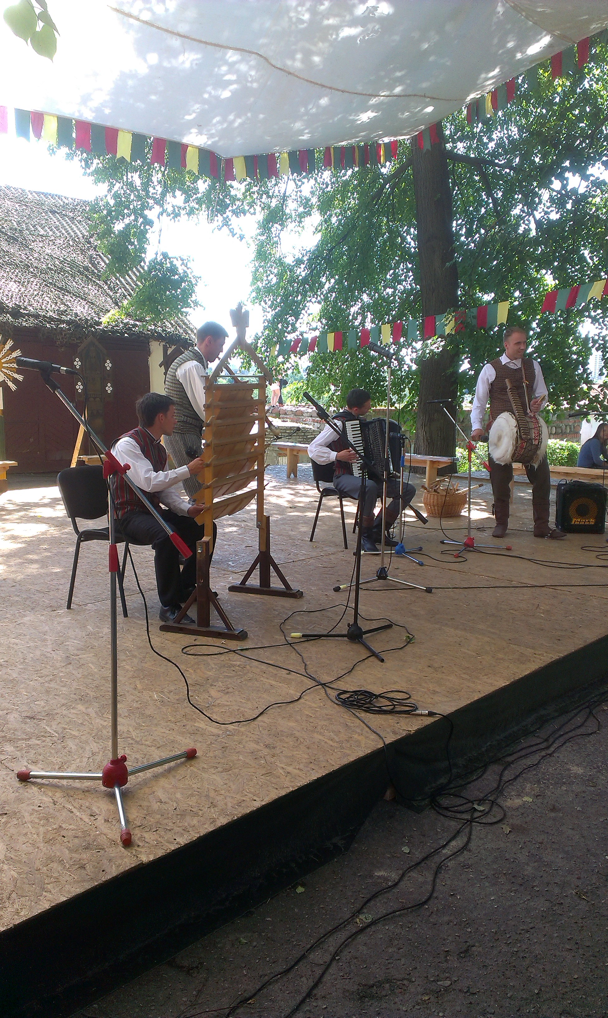 Літоўскі падворак на X Рэспубліканскім фестывале нацыянальных культур